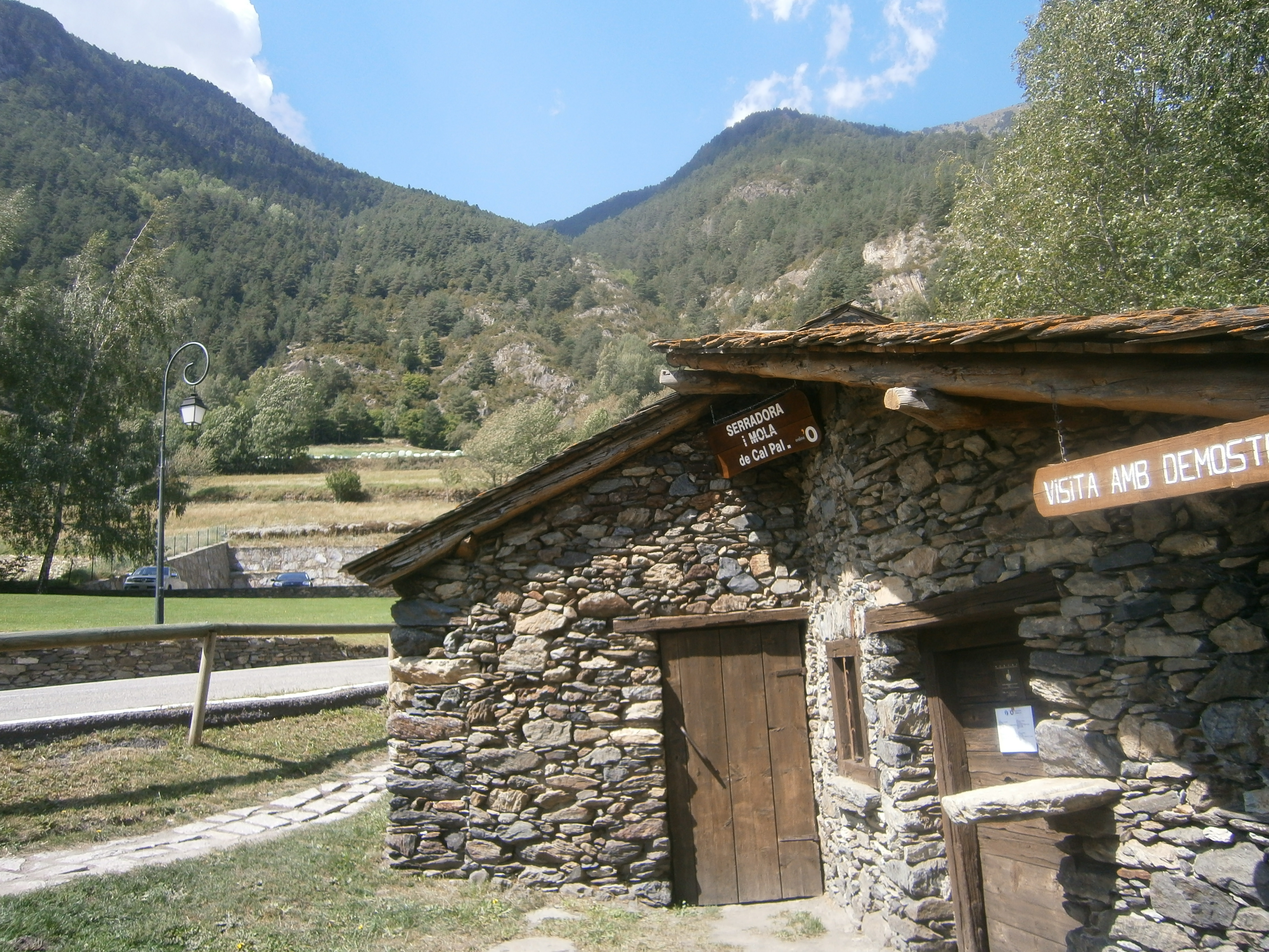 Mola i serradora de cal Pal a La cortinada, al costat de l'Església de Sant Martí de la Cortinada